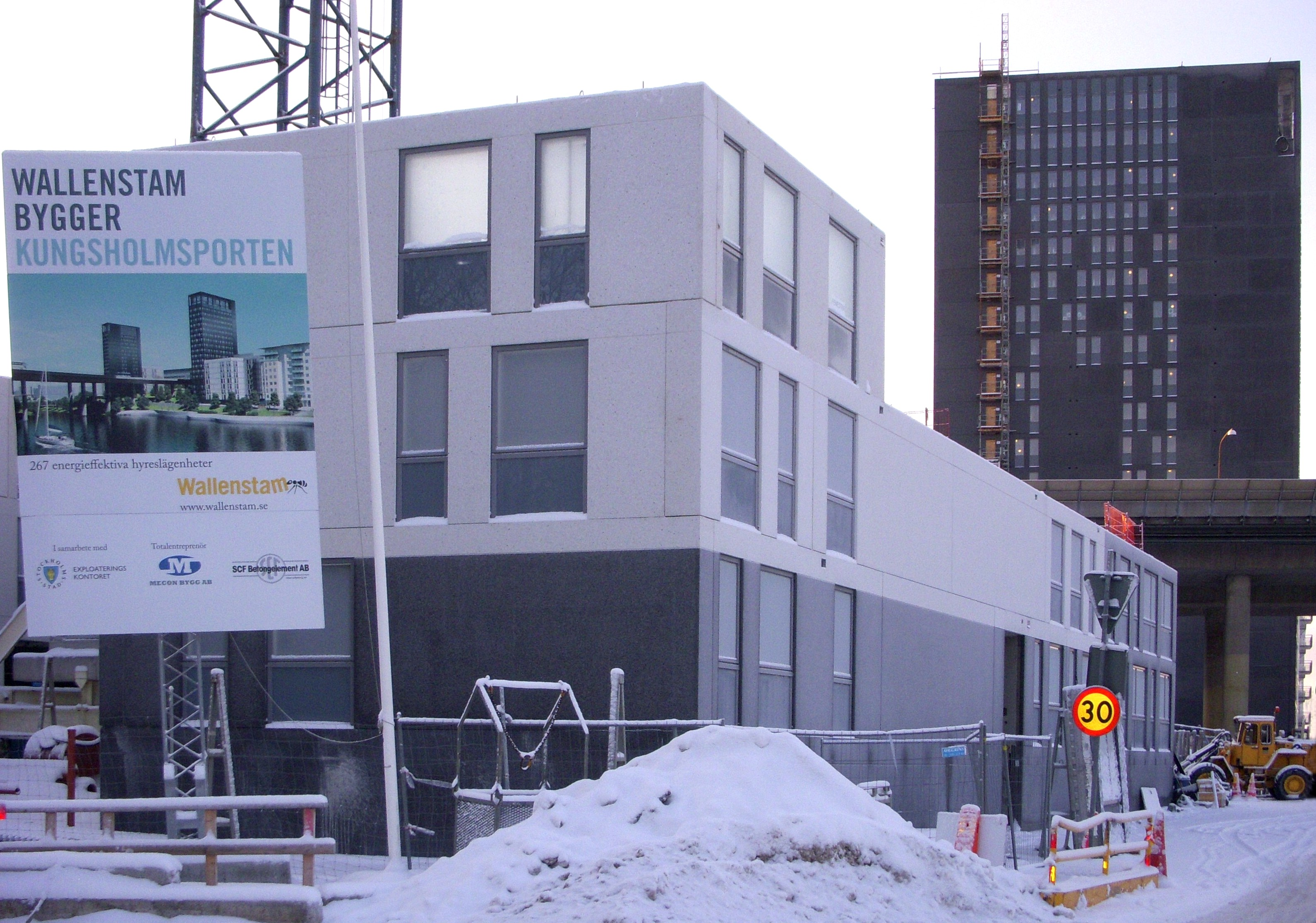 Tillingstorn (det västra) för "Kungsholmsporten" i kvarteret Brovakten på Kungsholmen och byggarbetena för det östra tornet.